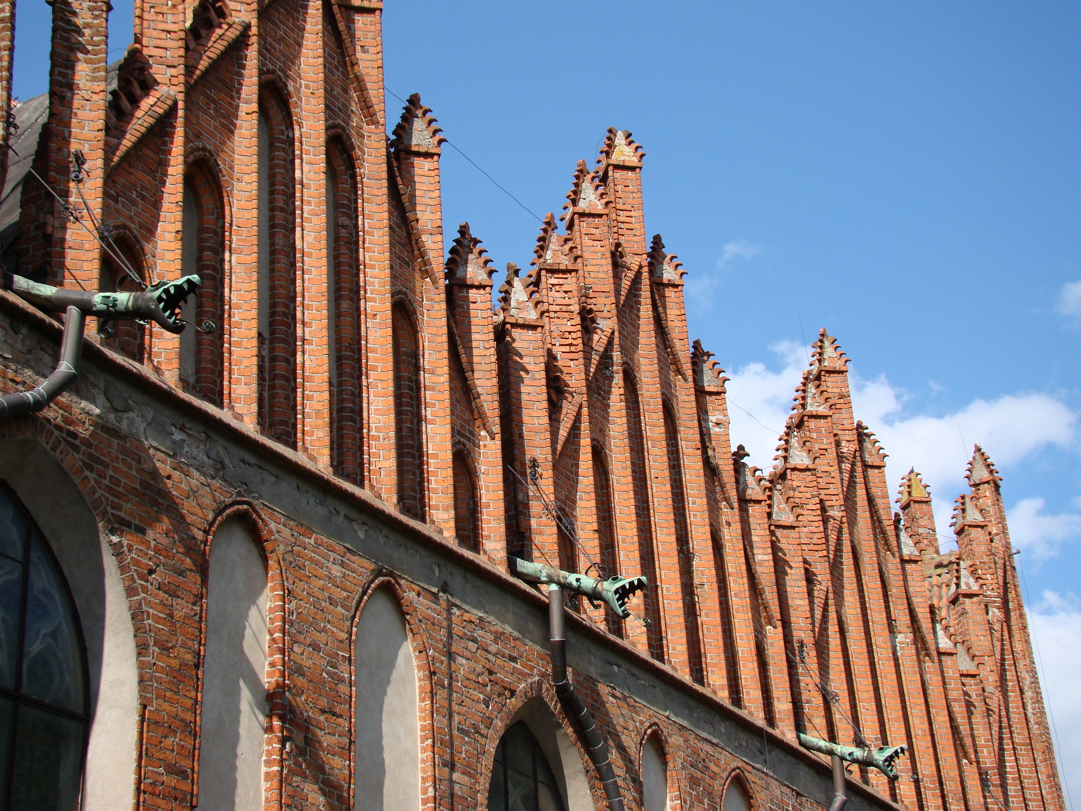 Orneta, ul. Kościelna 3 - kościół parafialny pw. św. Jana Chrzciciela (ozdobne zakończenia rynien - rzygacze)